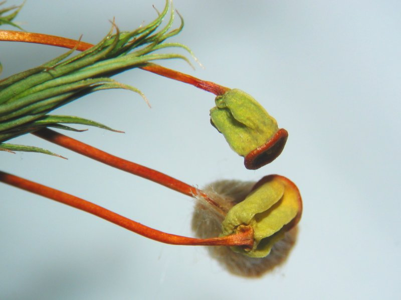 Goldenes Frauenhaar (Polytrichum commune), Kapseln